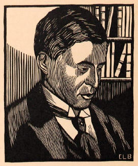 French composer Albéric Magnard (1865-1914)